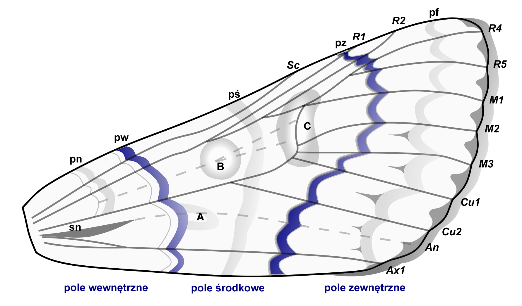 Przednie skrzydło sówkowatych.